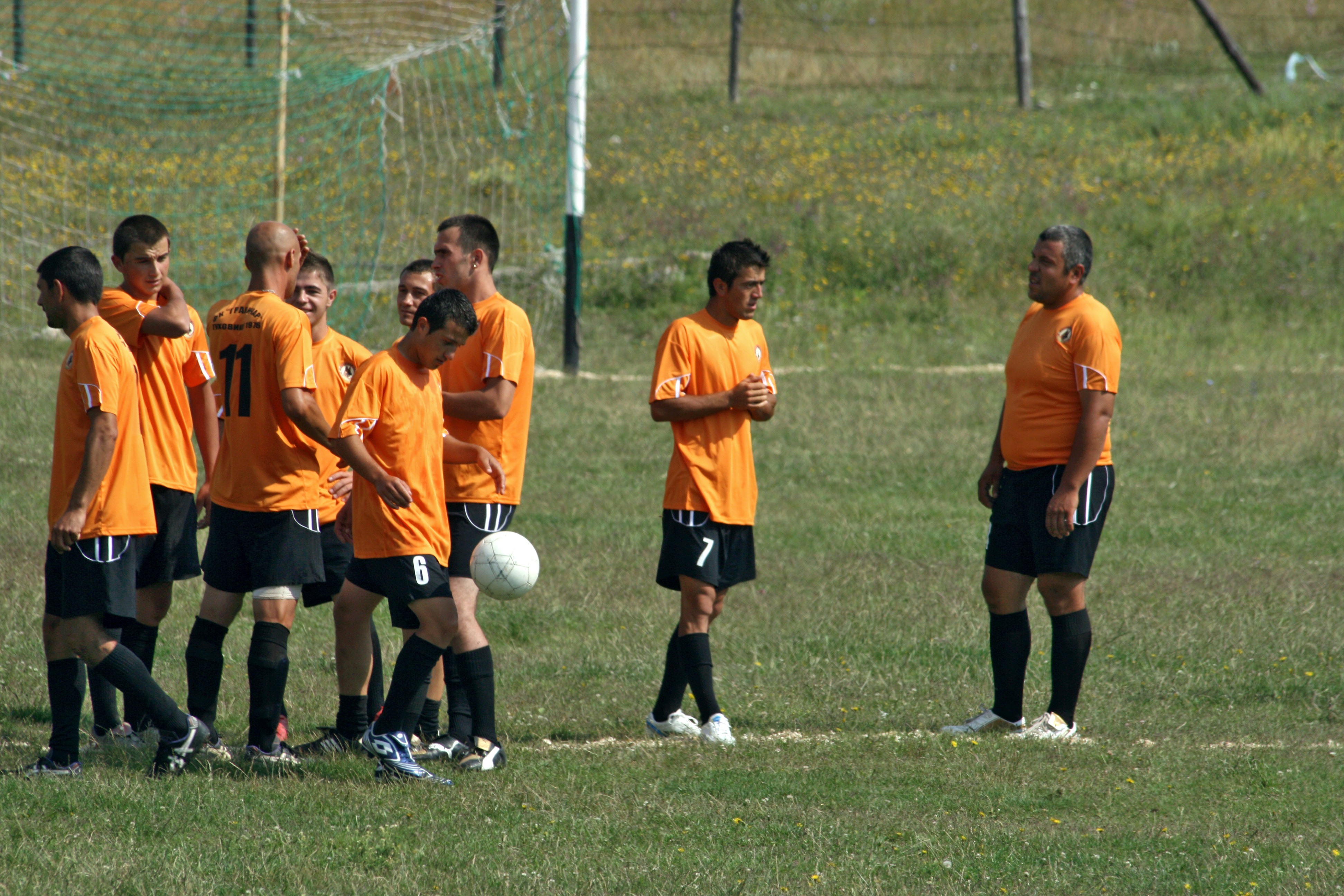 "Граничар" - Туховища по време на мач.